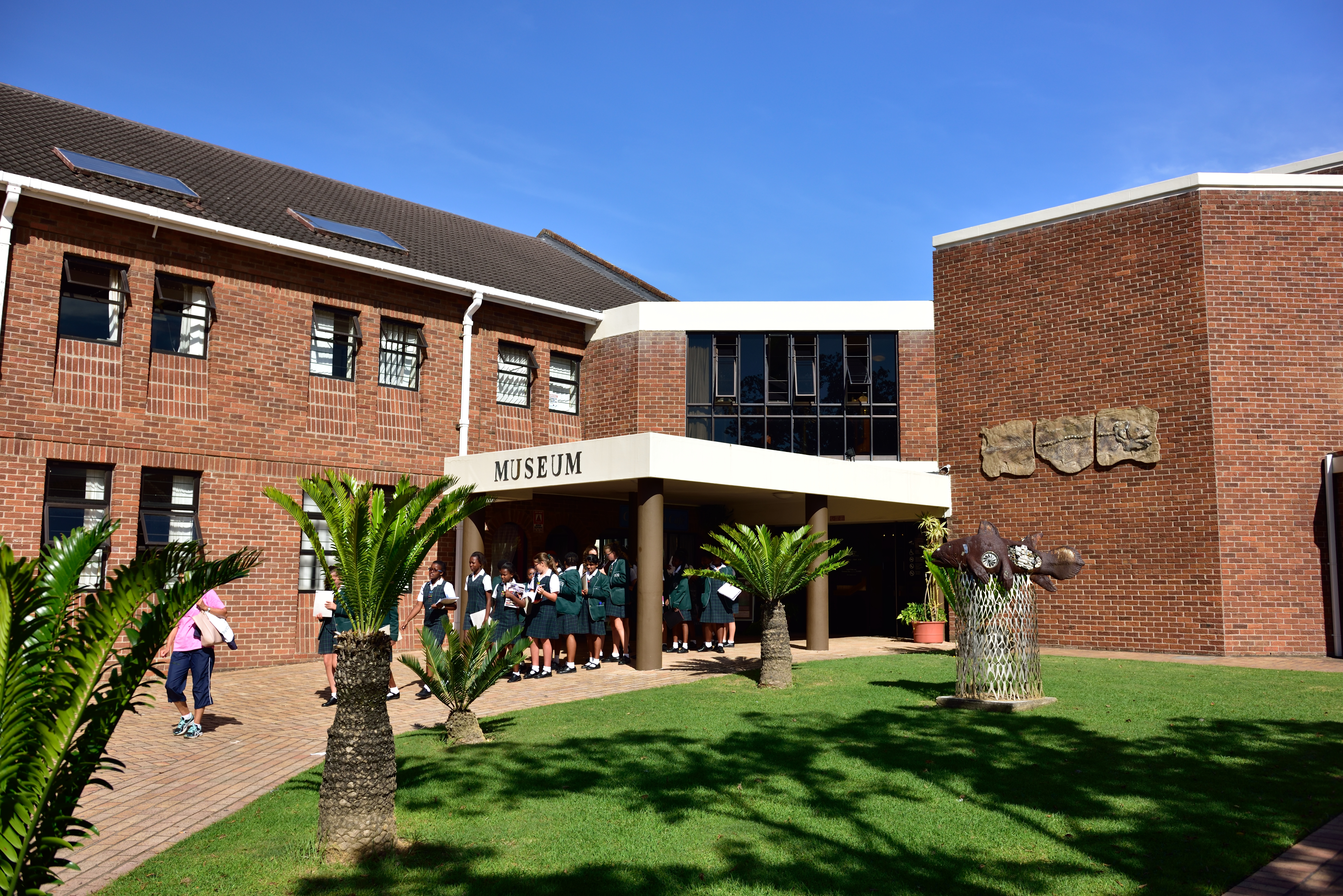 Vue de l'Eastern Cape en Afrique du Sud.